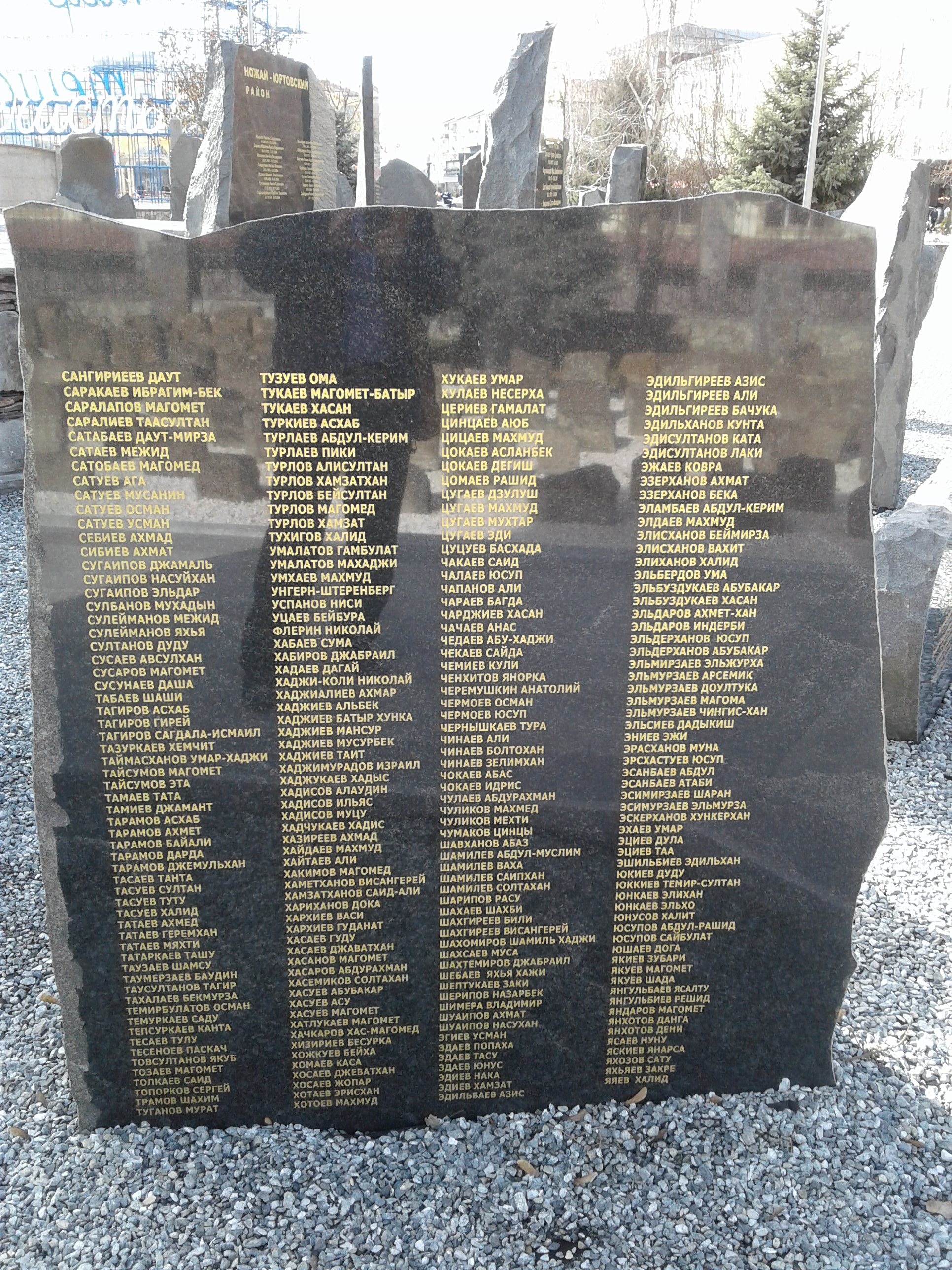 Мемориал памяти погибших в борьбе с терроризмом в Грозном